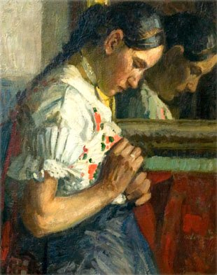 Kotász Károly Ara c. festménye